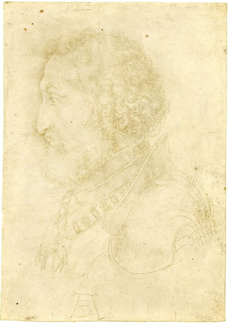 Pfalzgraf Friedrich der Weise, Zeichnung Dürers im British Museum